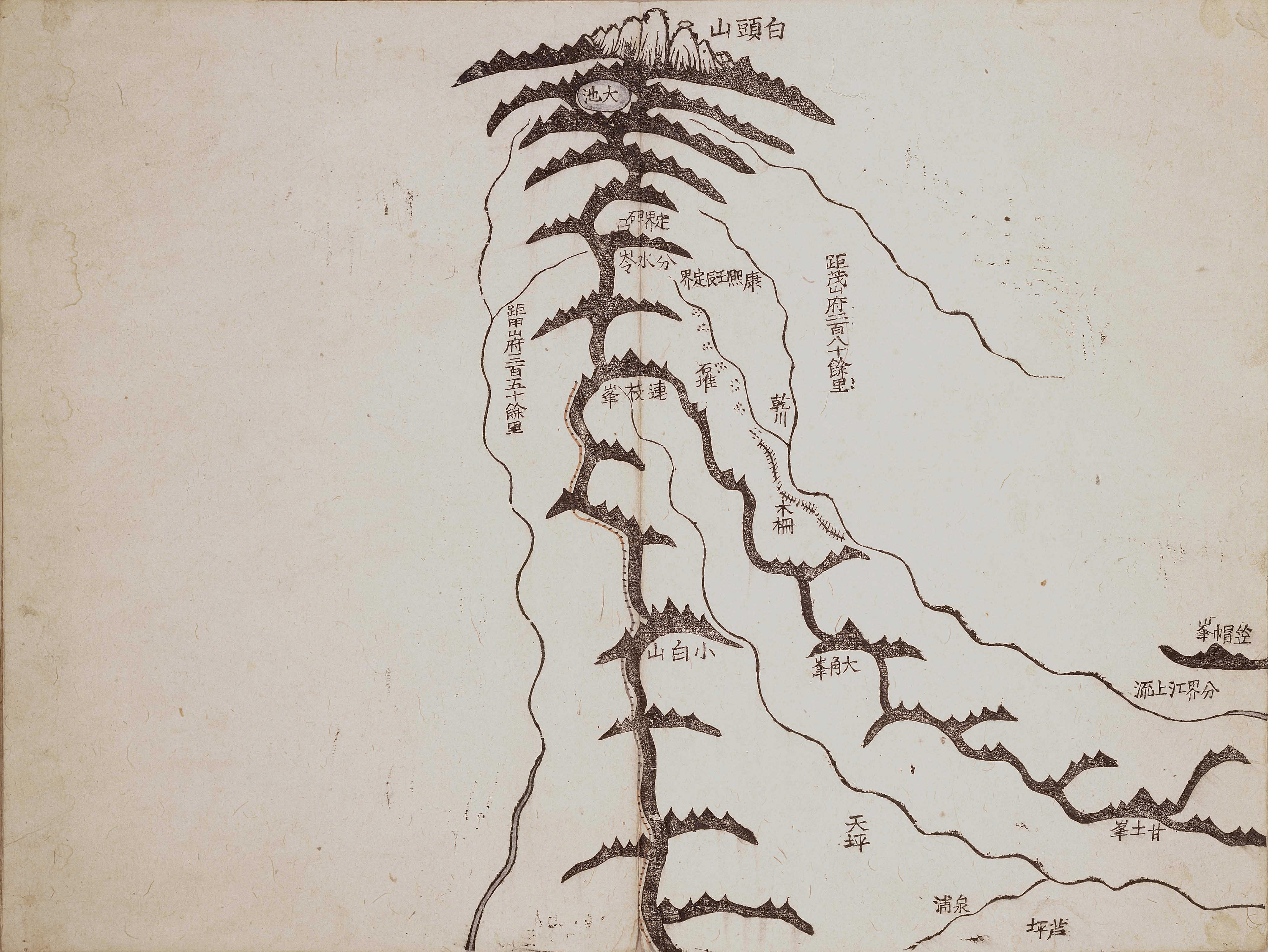 대동여지도